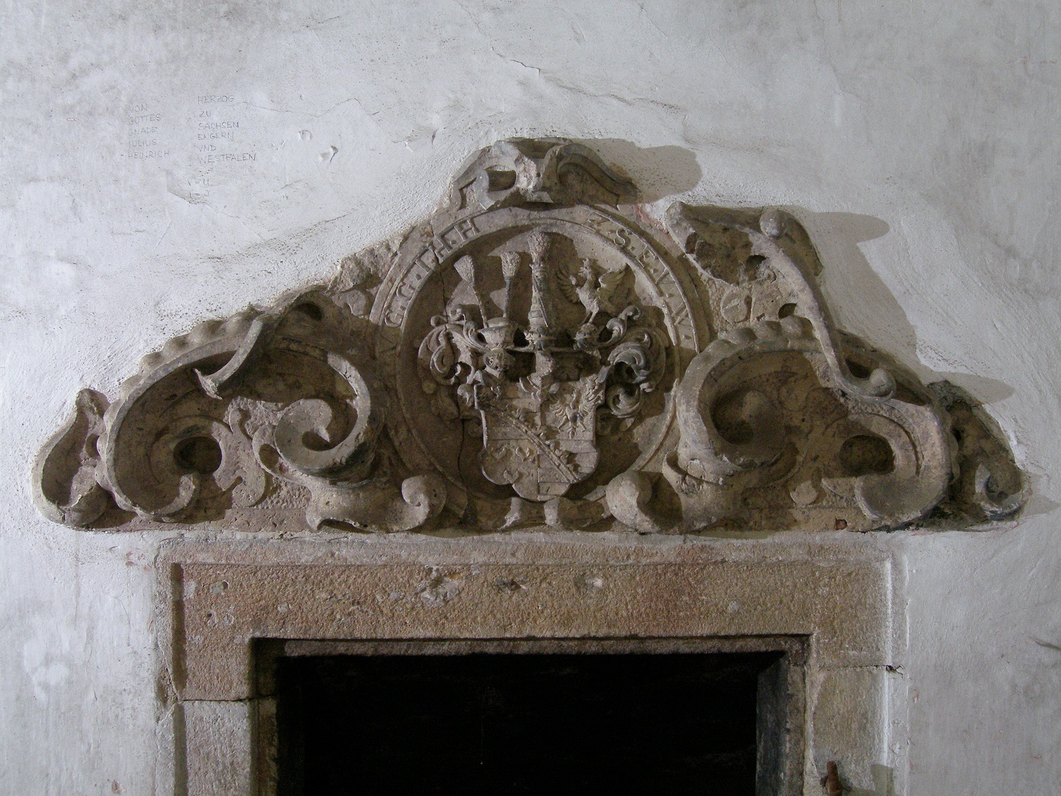 Toužim areál zámku. Erbovní deska sasko-lauenburského vévody Julia Jindřicha z doby kolem roku 1630, nalezená v objektu Horního zámku.